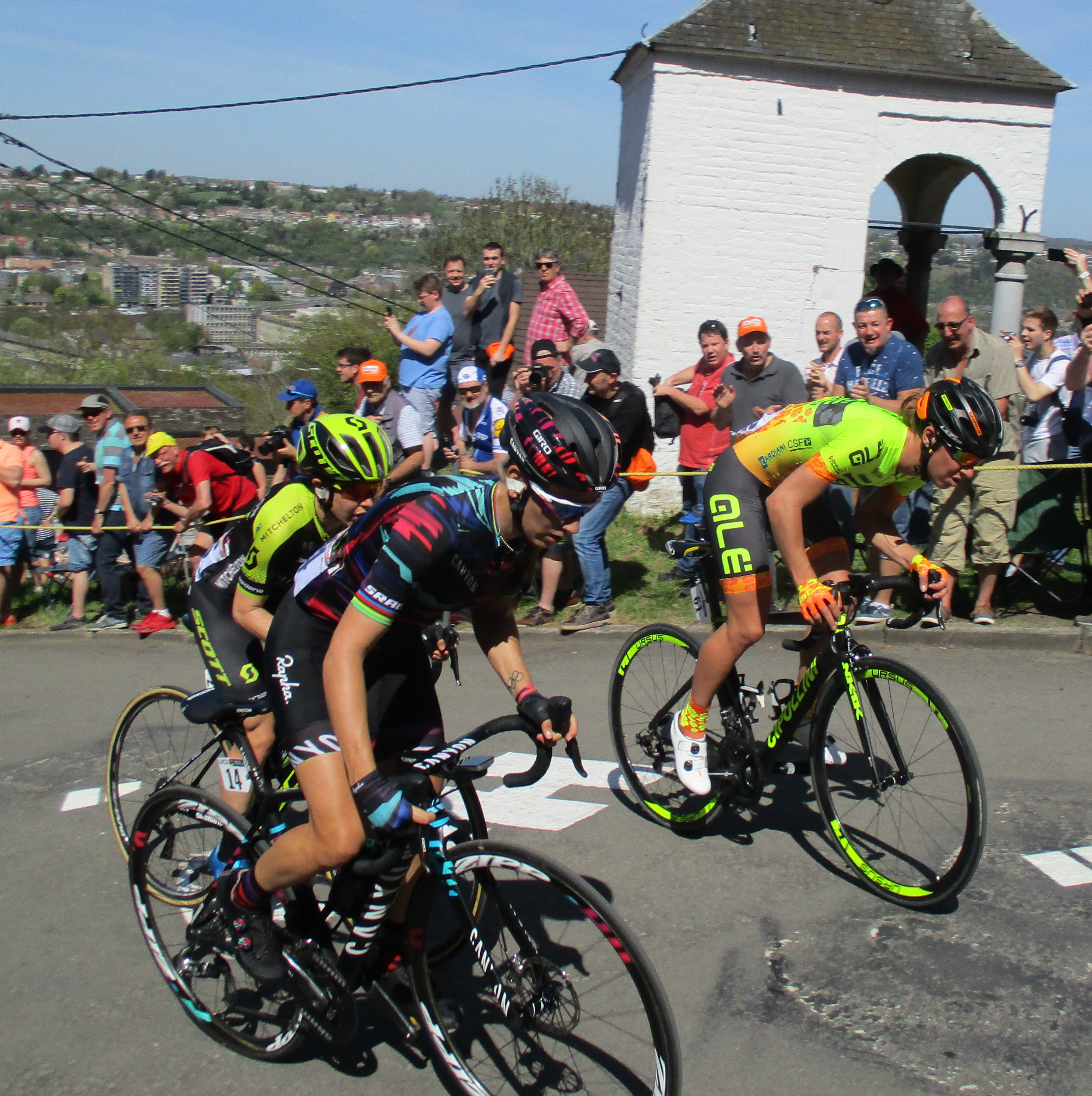 1e passage van de Waalse Pijl 2018 op de Mur van Huy.